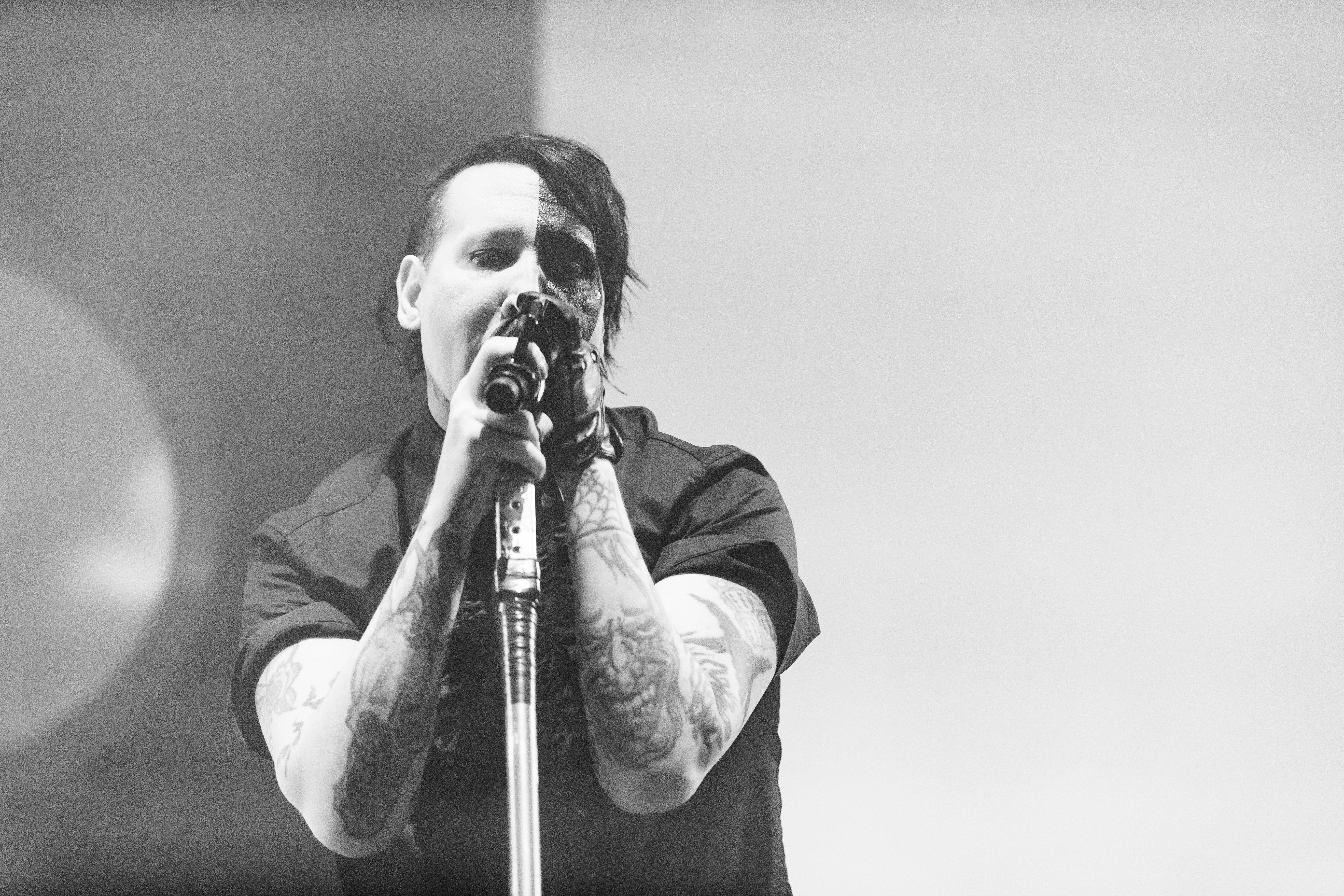 Marilyn Manson @ Rock am Ring 2018